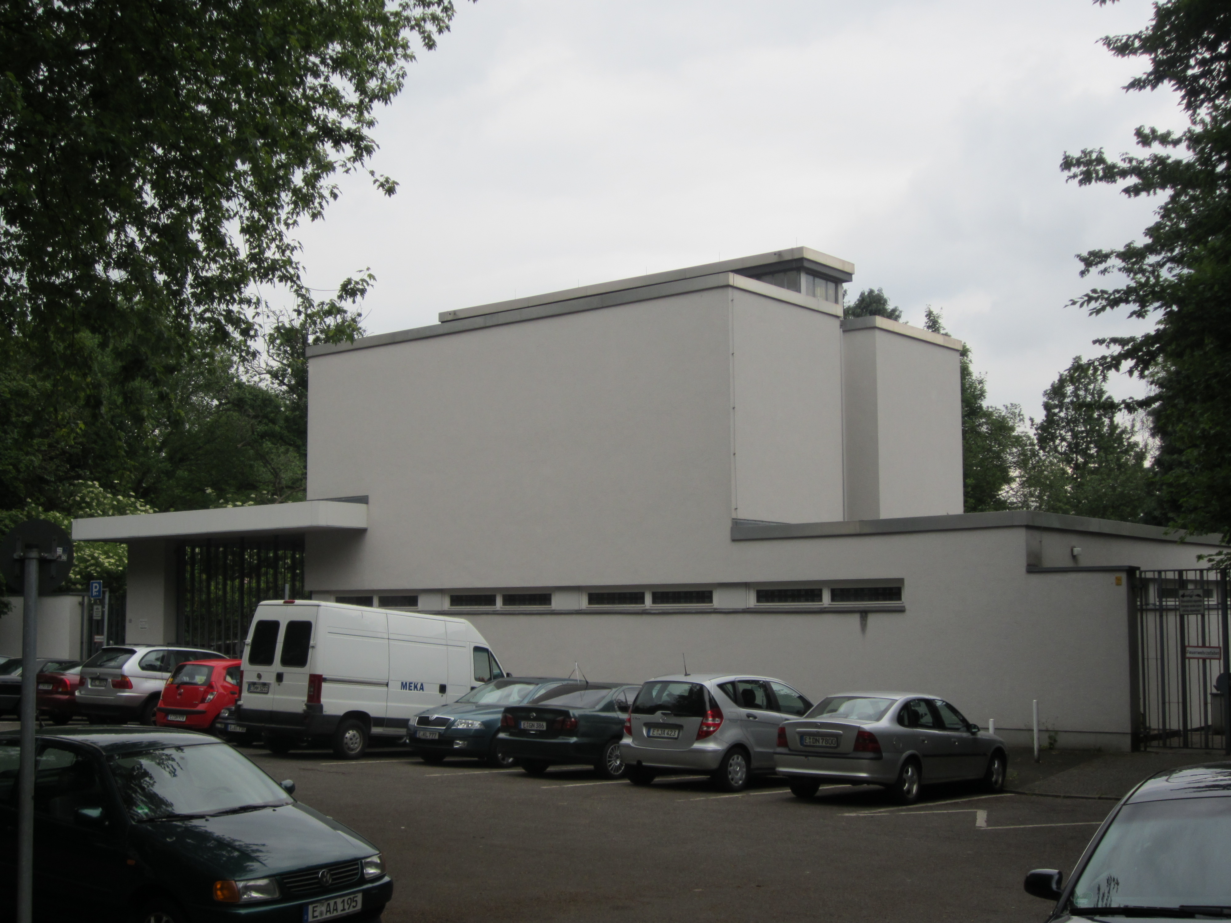 Jüdische Trauerhalle in Essen-Huttrop, Schulzstraße 25